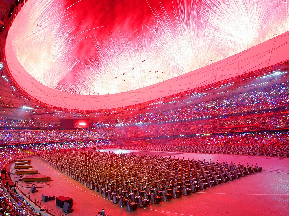 Fireworks